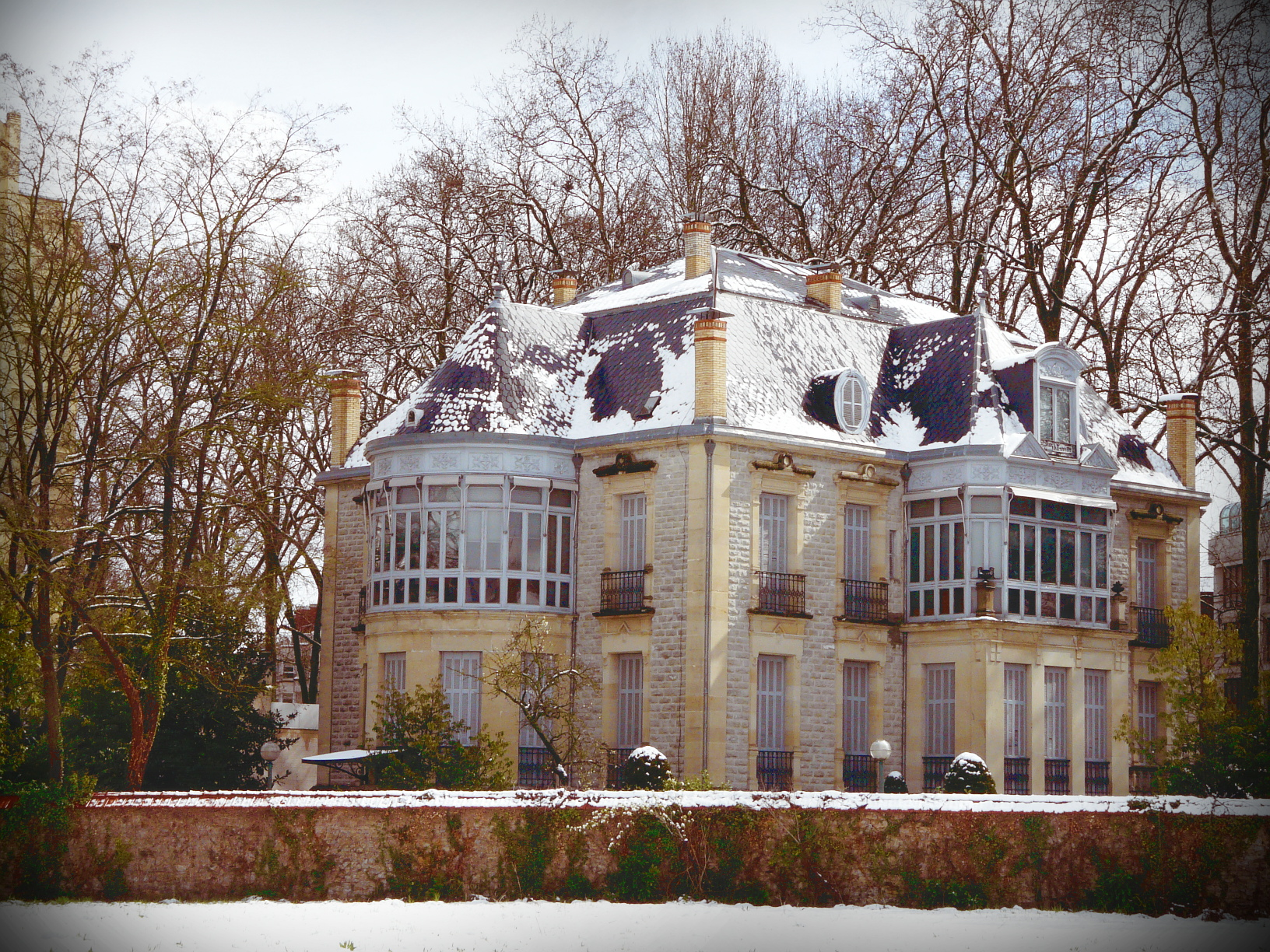 Palacio Zulueta, mandado construir por Alfredo de Zulueta como casa-hotel según los gustos historicistas de la época (1902-1903). Ha sido la sede de la biblioteca de la Fundación Sancho el Sabio, centro de documentación sobre la cultura vasca